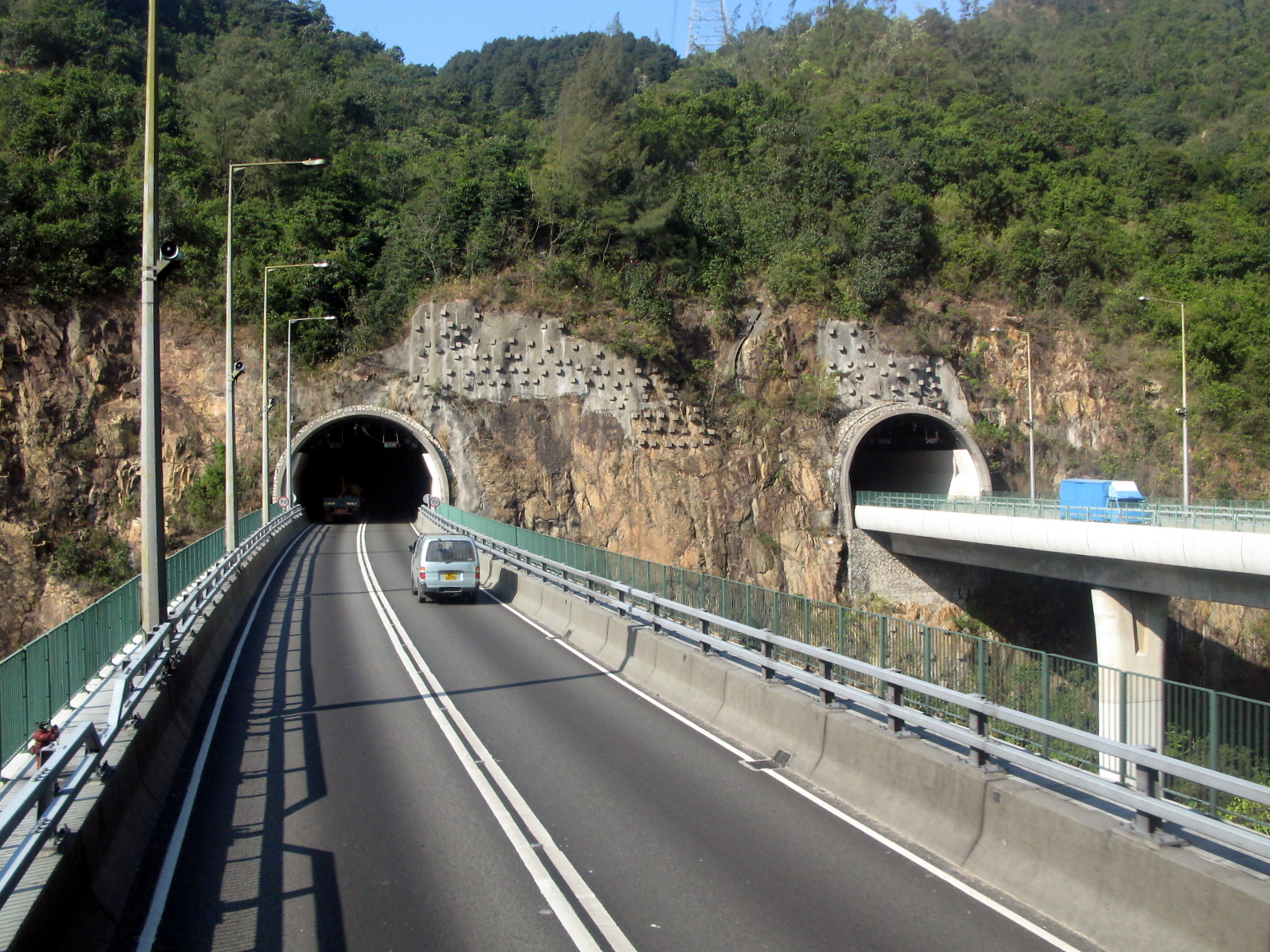 HK Shing Mun Tunnel Flyover.